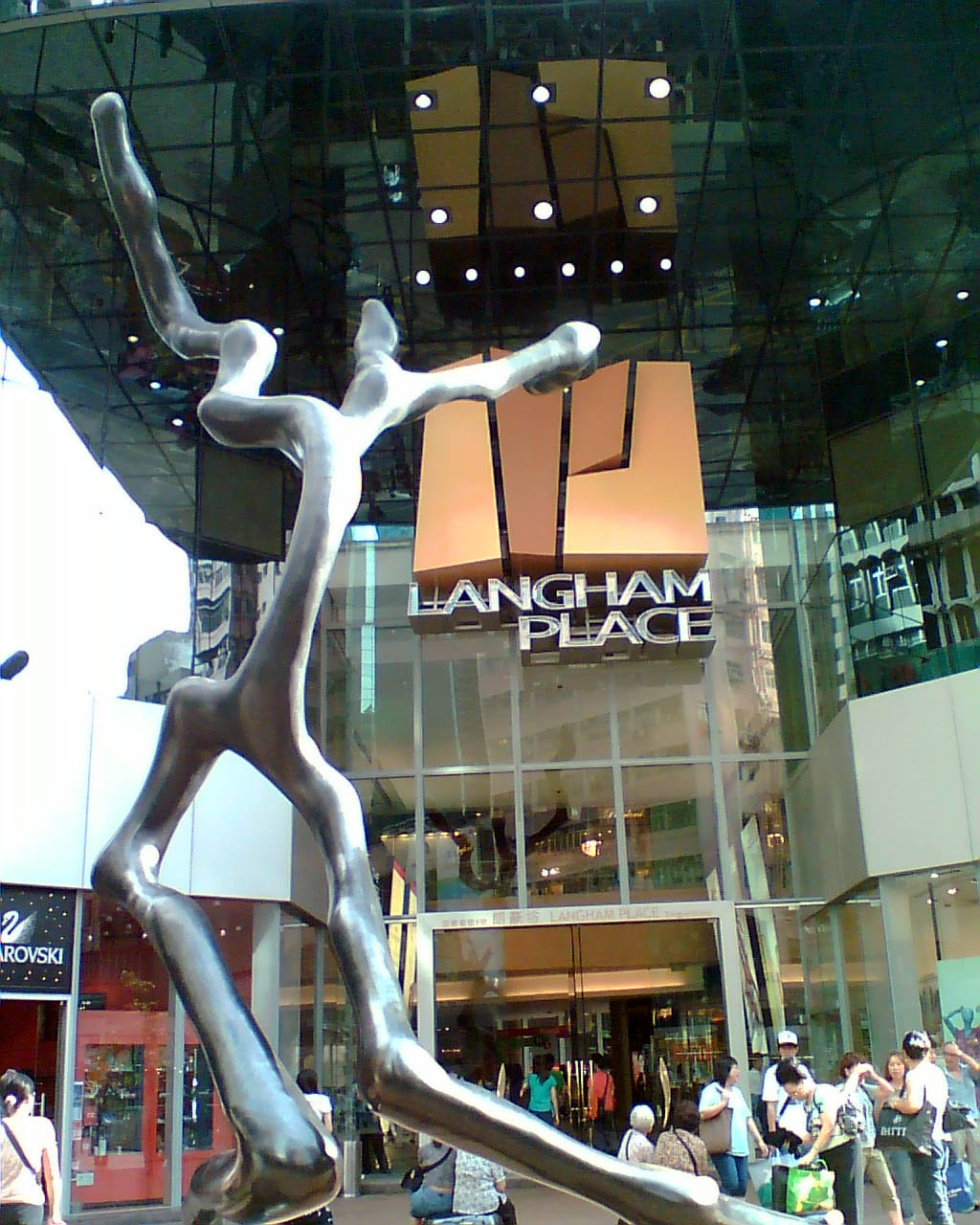 朗豪坊入口